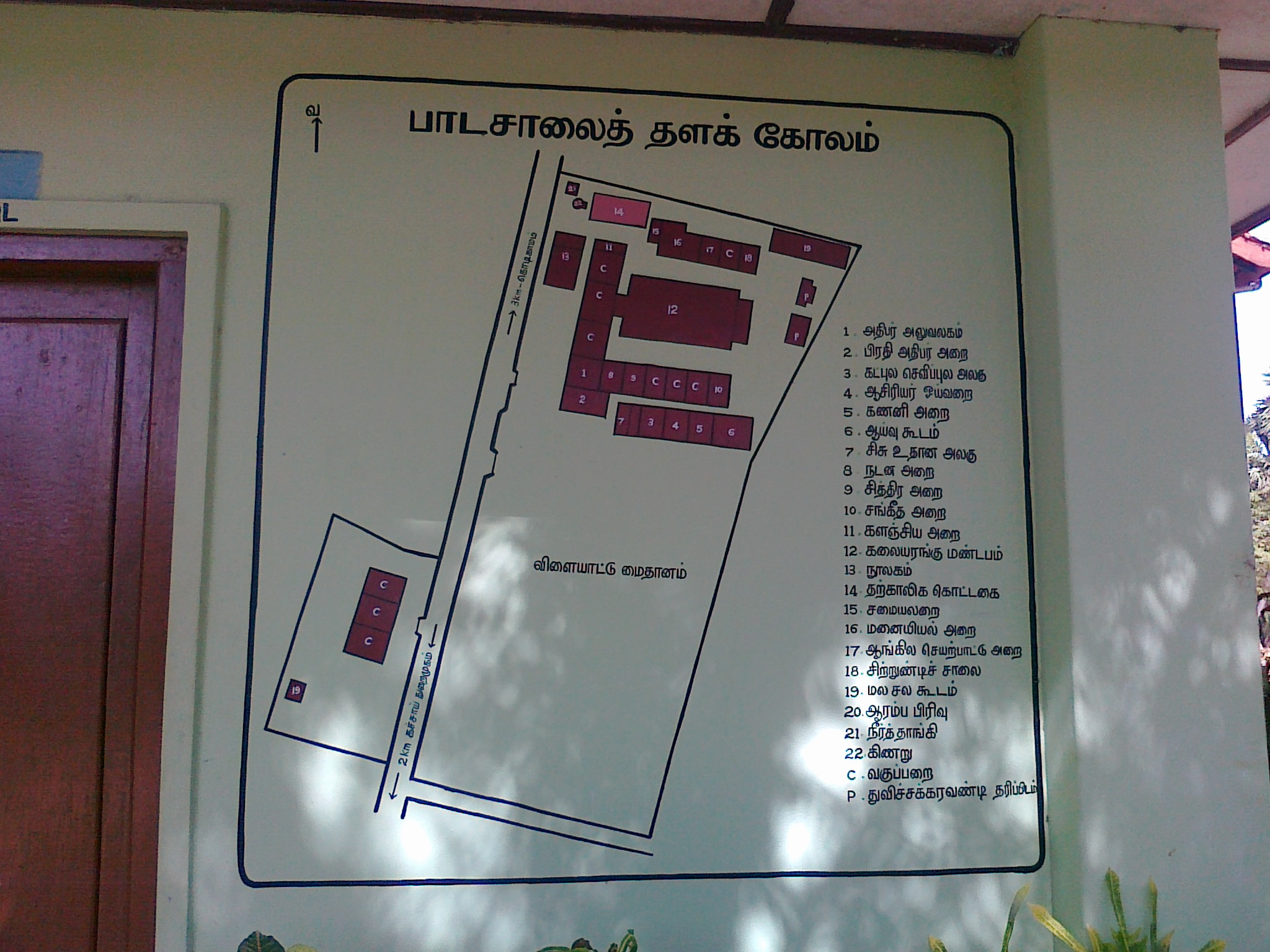 பாடசாலை